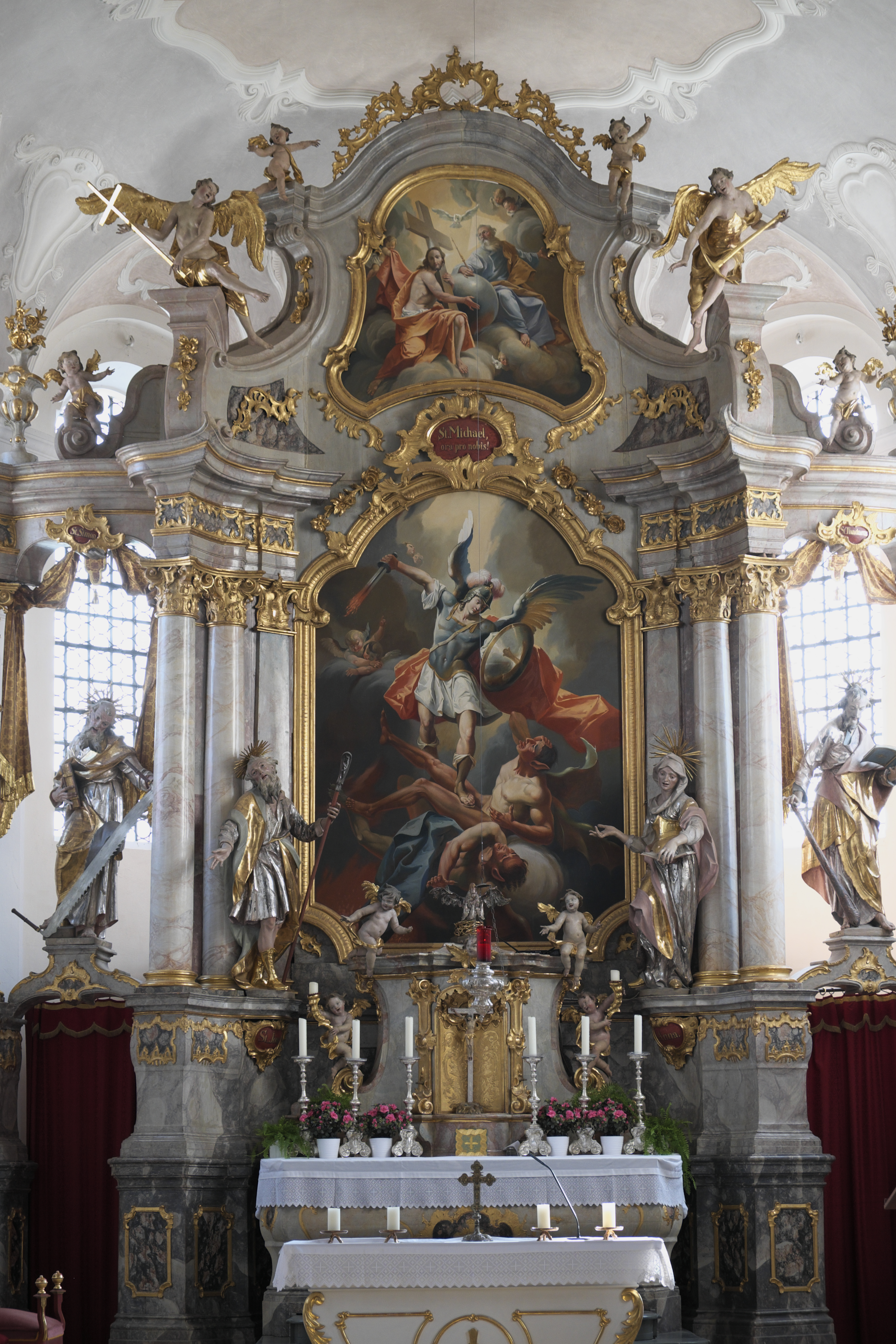 Katholische Pfarrkirche St. Michael in Reichenkirchen (Fraunberg) im Landkreis Erding (Bayern/Deutschland), Innenraum